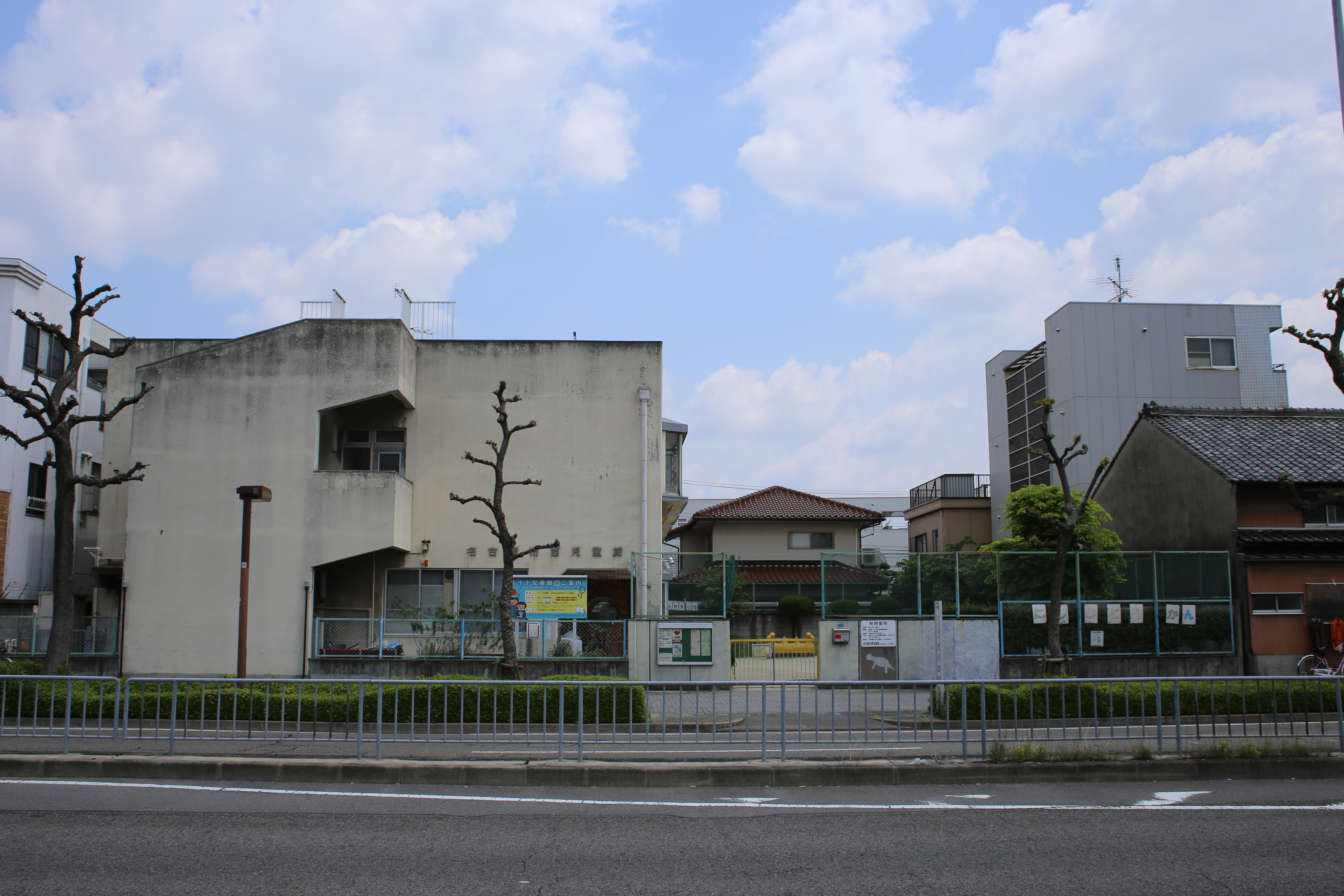 名古屋市西区花の木二丁目の名古屋市西児童館を西側公道より撮影